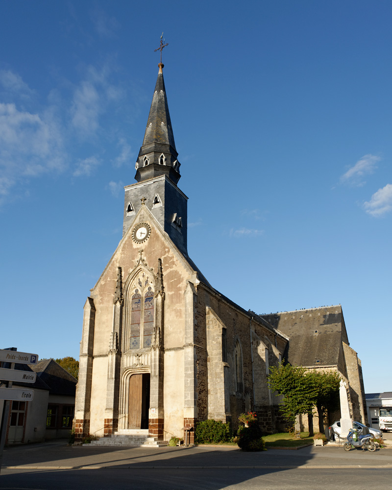 Église Saint-Pierre de Souday, (Classé, 1912) .